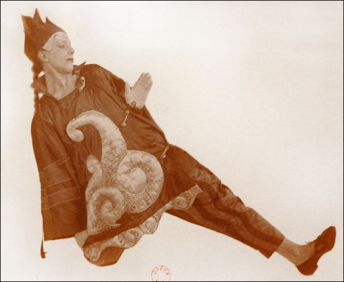 Lachmann Photographie BnF Léonide Massine dans le rôle du Prestidigitateur chinois de Parade, Ballet de Léonide Massine Création au Théâtre du Châtelet en 1917 Exposition Ballets russes Bibliothèque-musée de l'Opéra de Paris